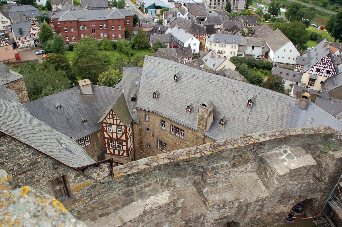 Burg Runkel, Runkel (Lahn), Hessen, Deutschland